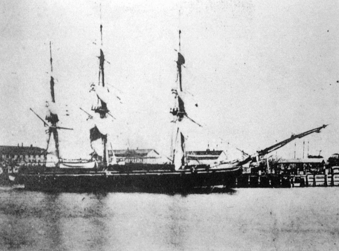 a ship kurofune サラトガ号 (Se Ra To Ga- USS Saratoga) 黒船